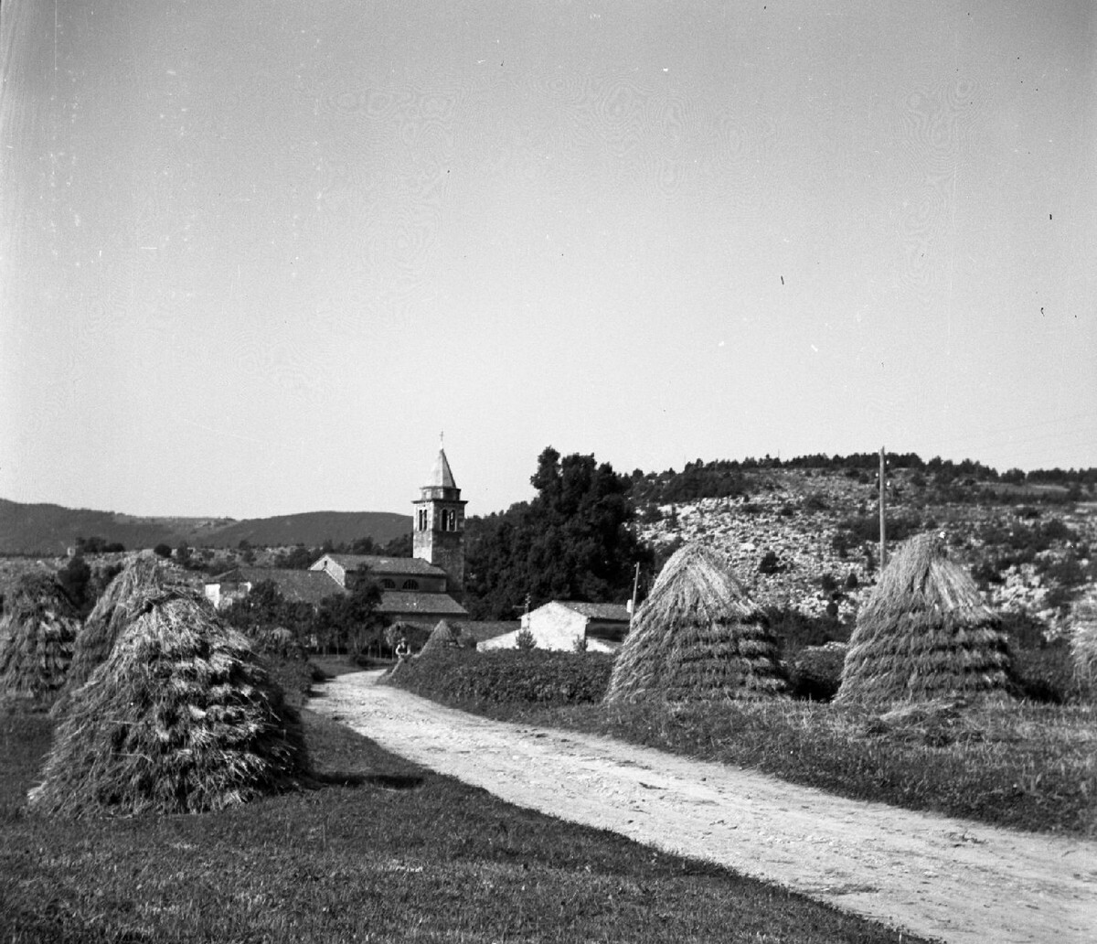 Brezovica, pogled na cerkev in hiše, spredaj žito v "luoncih".